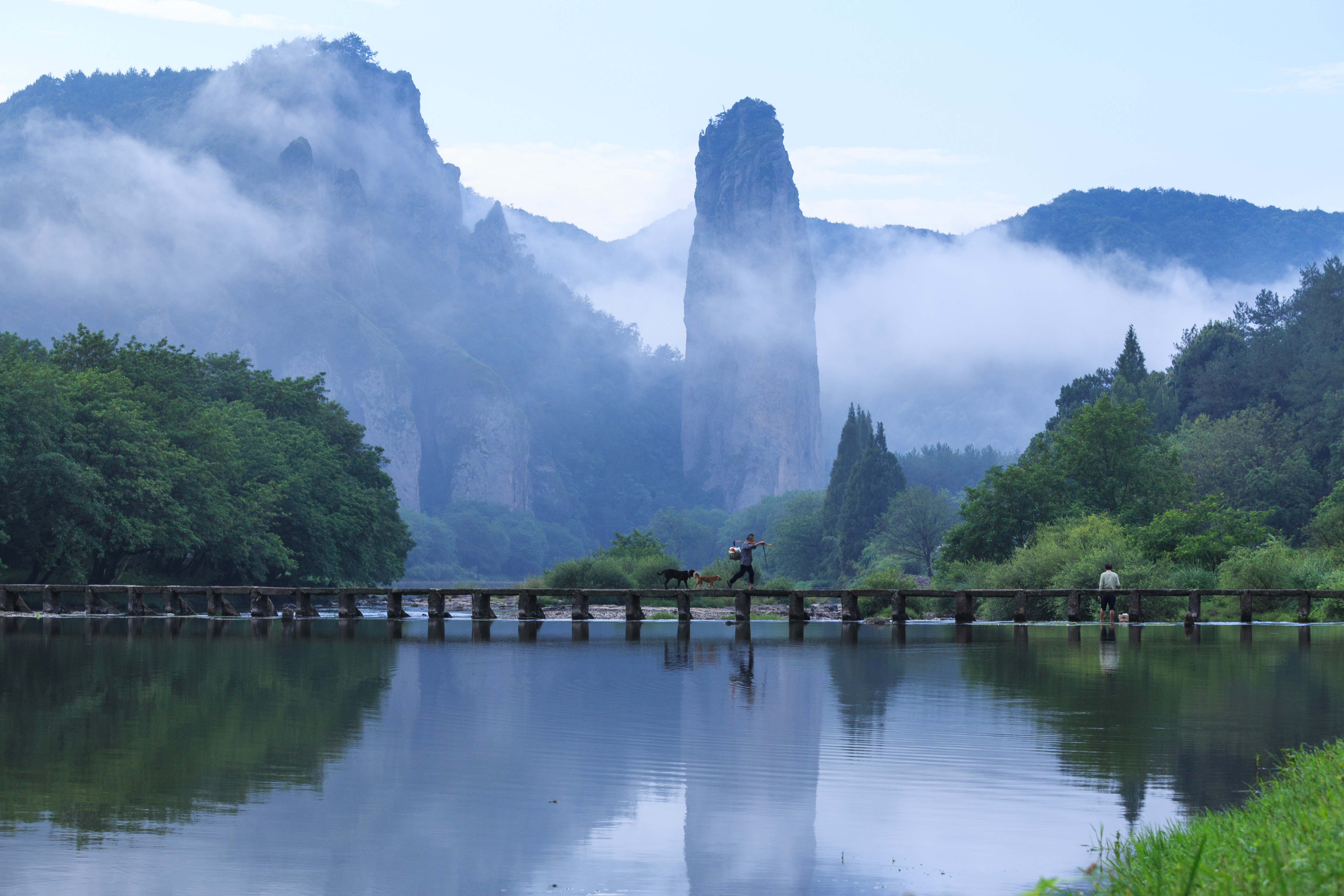 仙都鼎湖峰和石梁桥